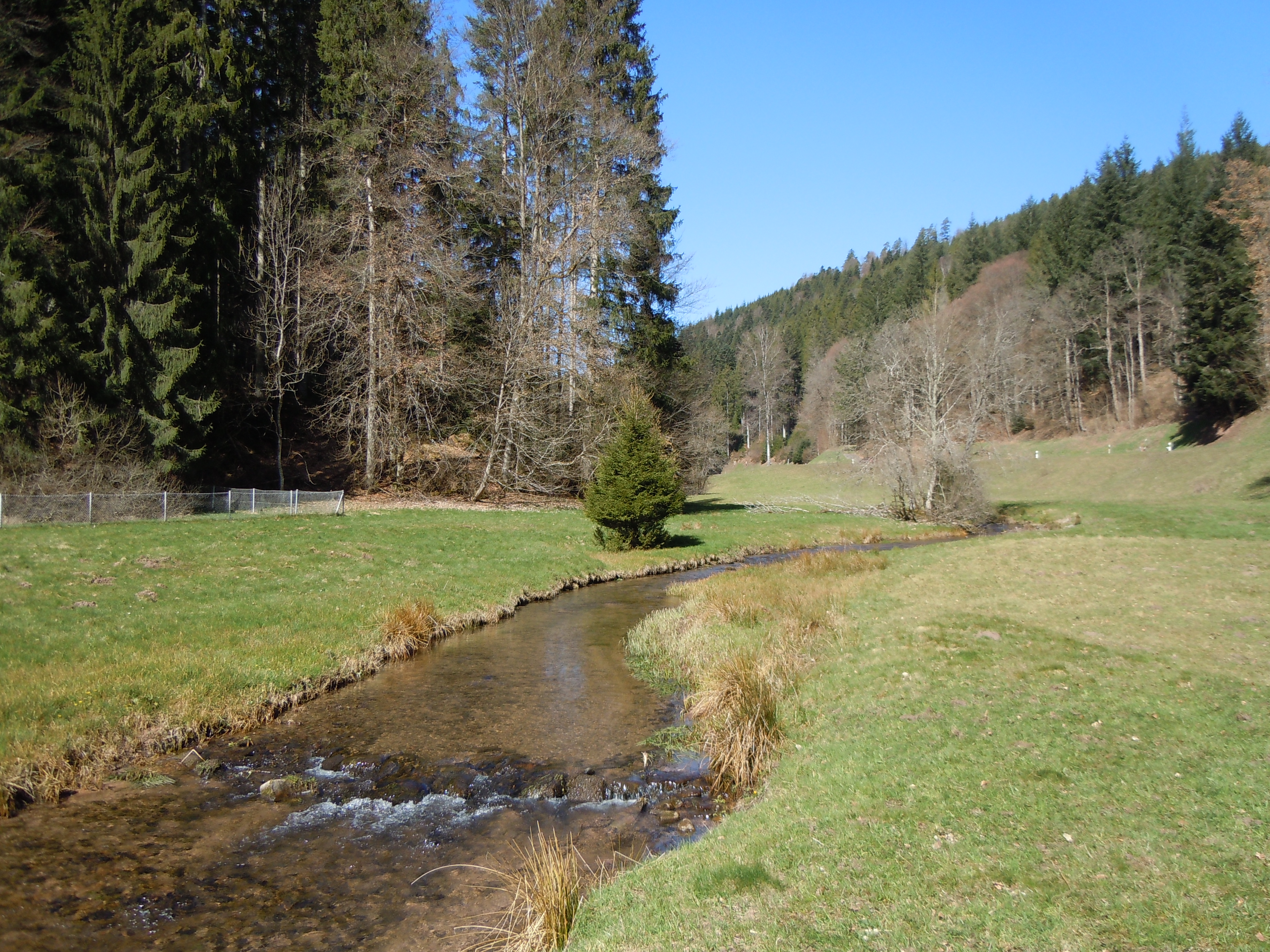 Köllbach im Naturschutzgebiet Köllbachtal mit Seitentälern.